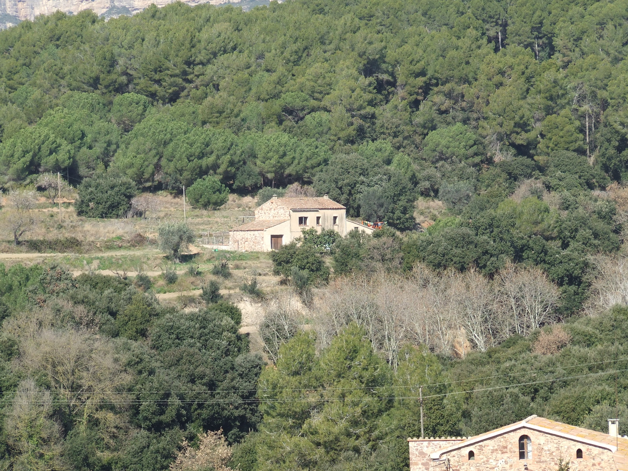 Can Piler (Bigues, Bigues i Riells, Vallès Oriental)